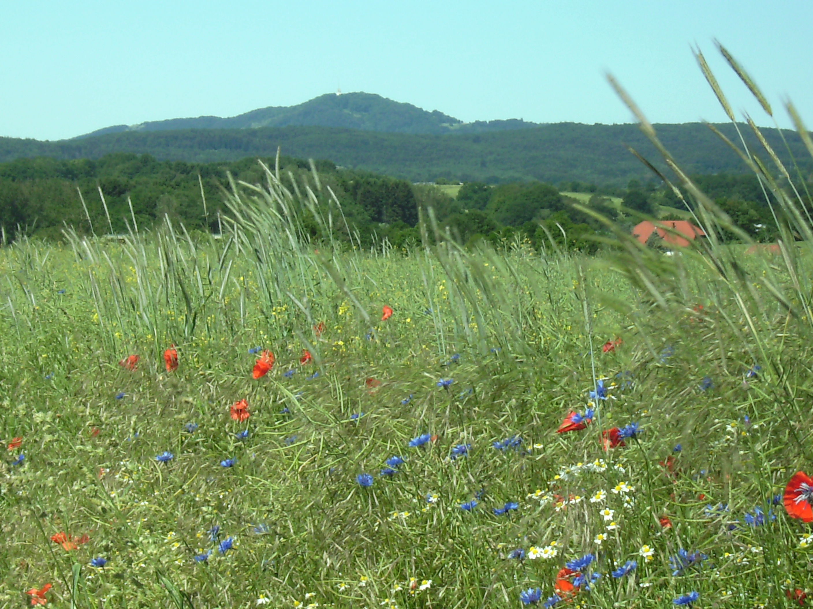 Schaumberg, von der Baltersweiler Höhe her gesehen